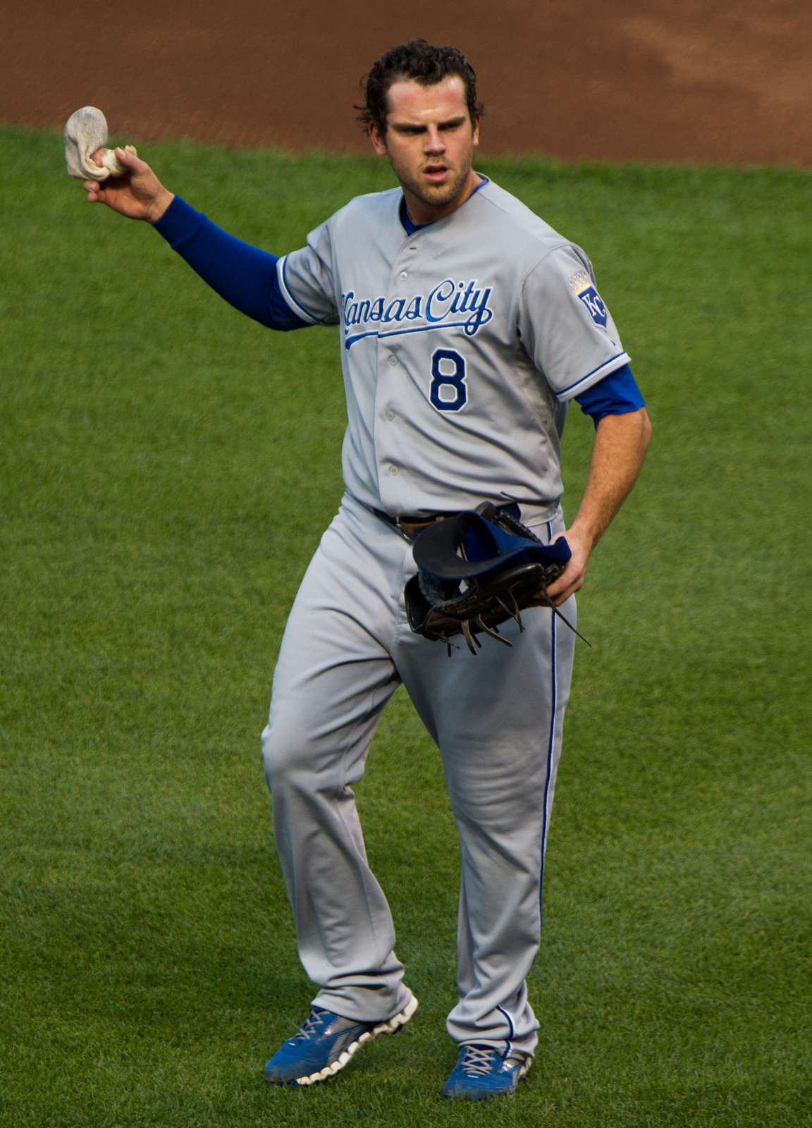 Mike Moustakas